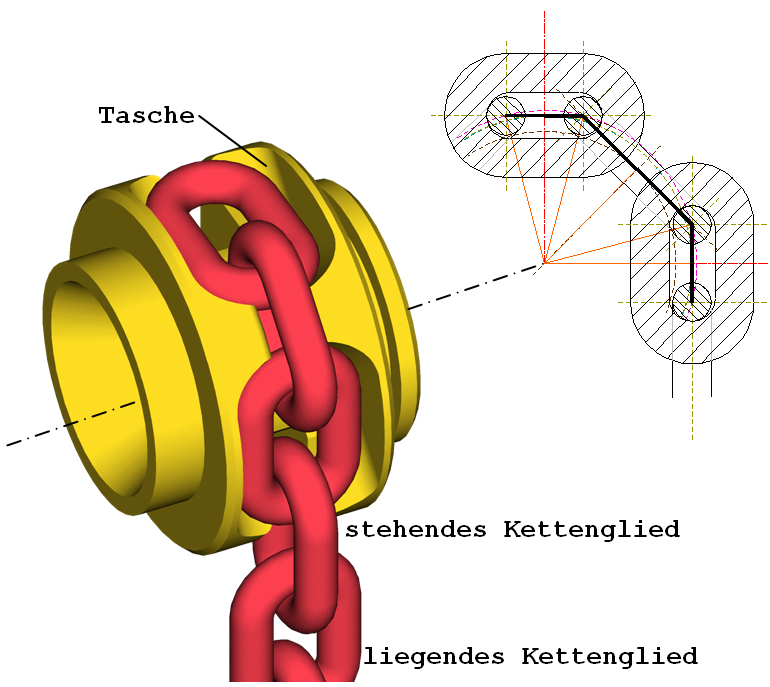 Zusammenwirken von Rundstahlkette und Kettenrad (hier ein Taschenrad)